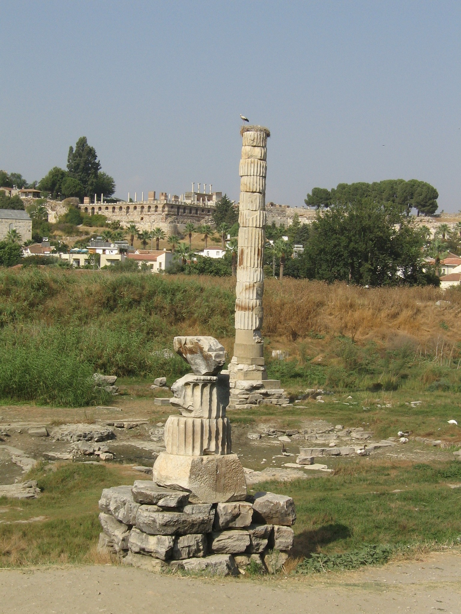 Ostaci Artemidinog hrama u Efezu.